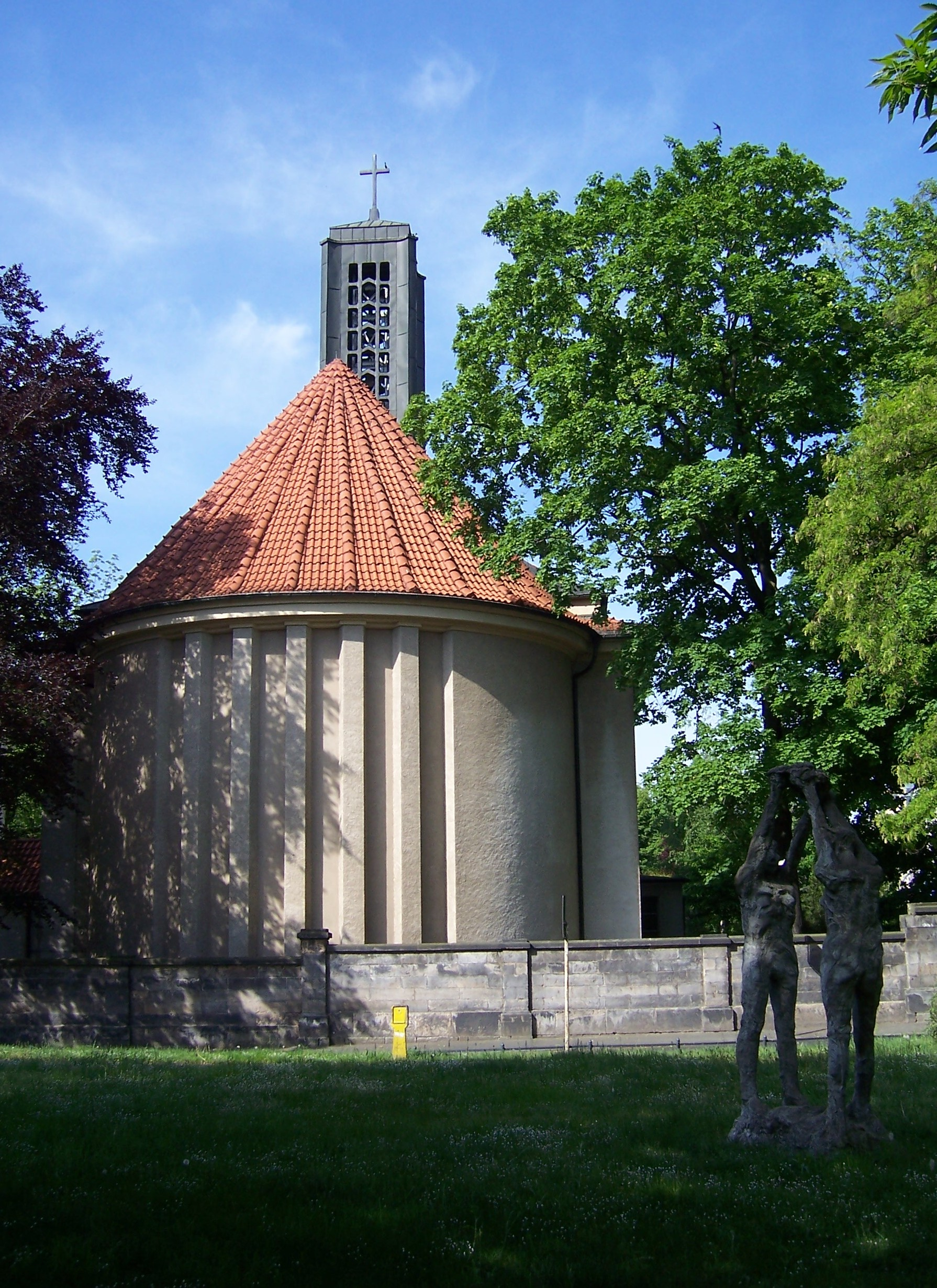 Kirche des Diakonissenkrankenhaus in Dresden